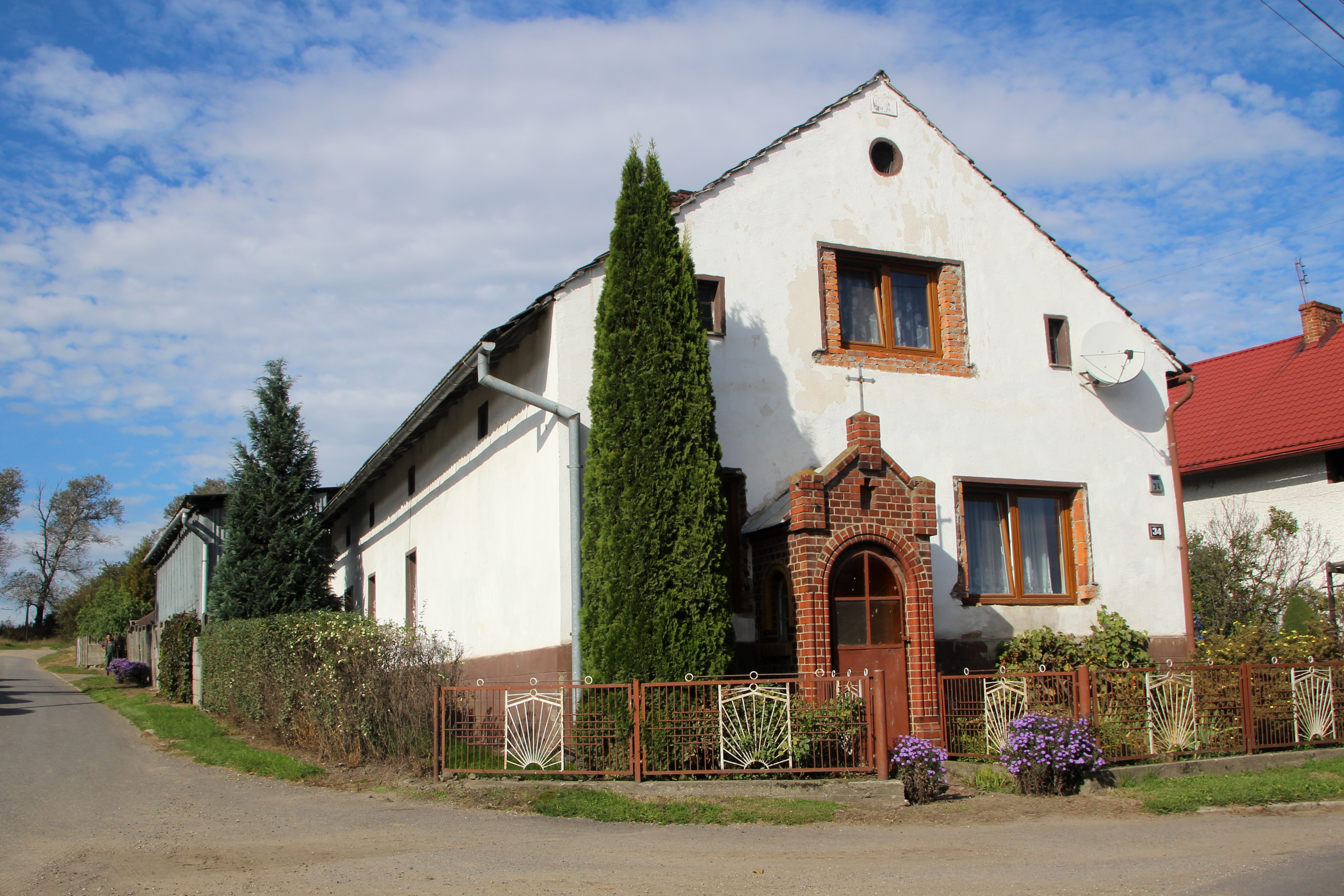 Dzielawy (dodatkowa nazwa w j. niem. Dzielau)- wieś w Polsce położona w województwie opolskim, w powiecie kędzierzyńsko-kozielskim, w gminie Polska Cerekiew.